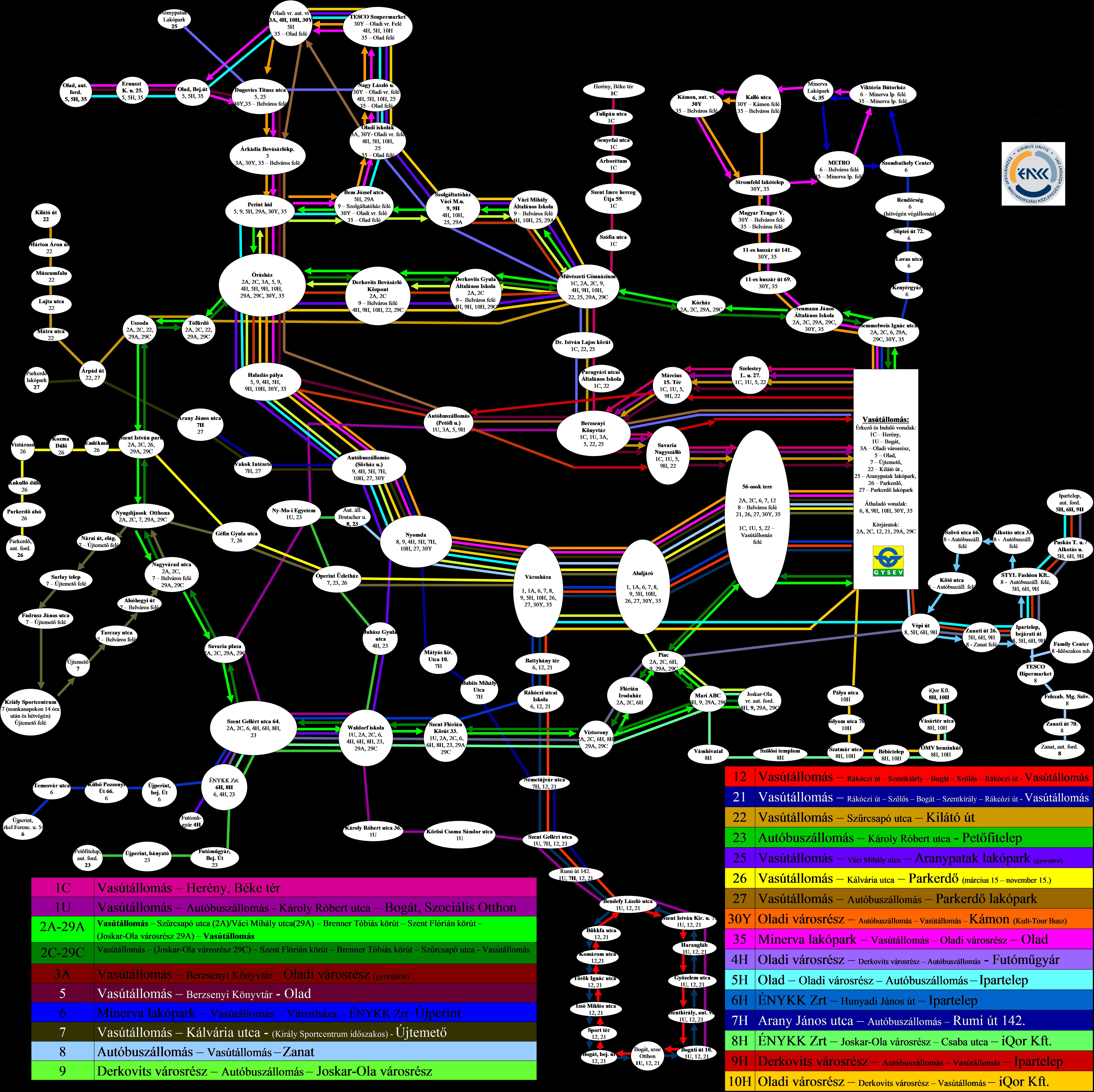 Szombathely sematikus térképe